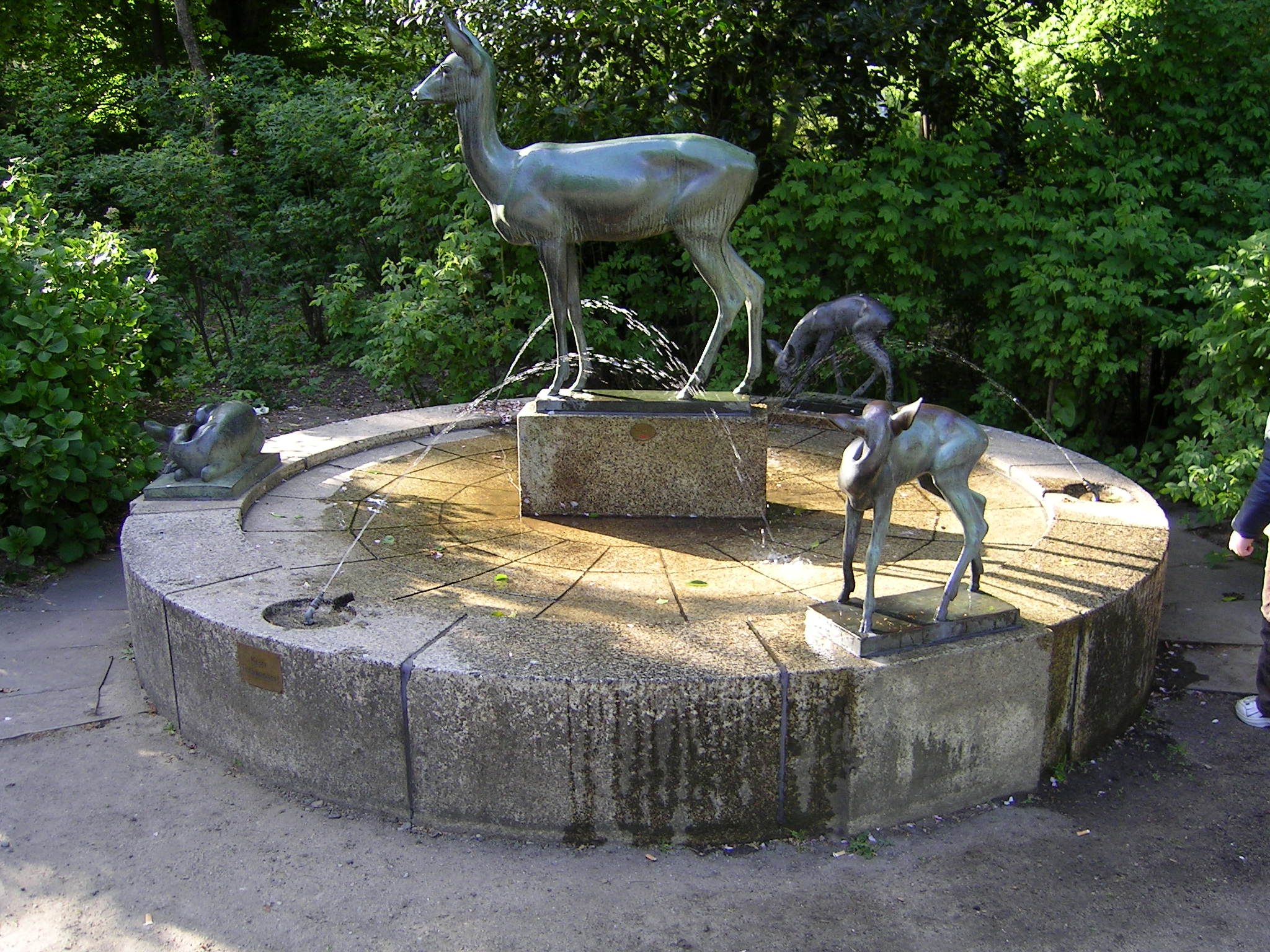 53°04′47.20″N 8°48′22.35″E / 53.079778°N 8.8062083°E Spinster fountain is just 20 meters away from the main windmill in bremen city Das abgebildete Objekt ist ein geschütztes Kulturdenkmal in der Freien Hansestadt Bremen, mit der Nr. 1193,T007 beim Landesamt für Denkmalpflege registriert.